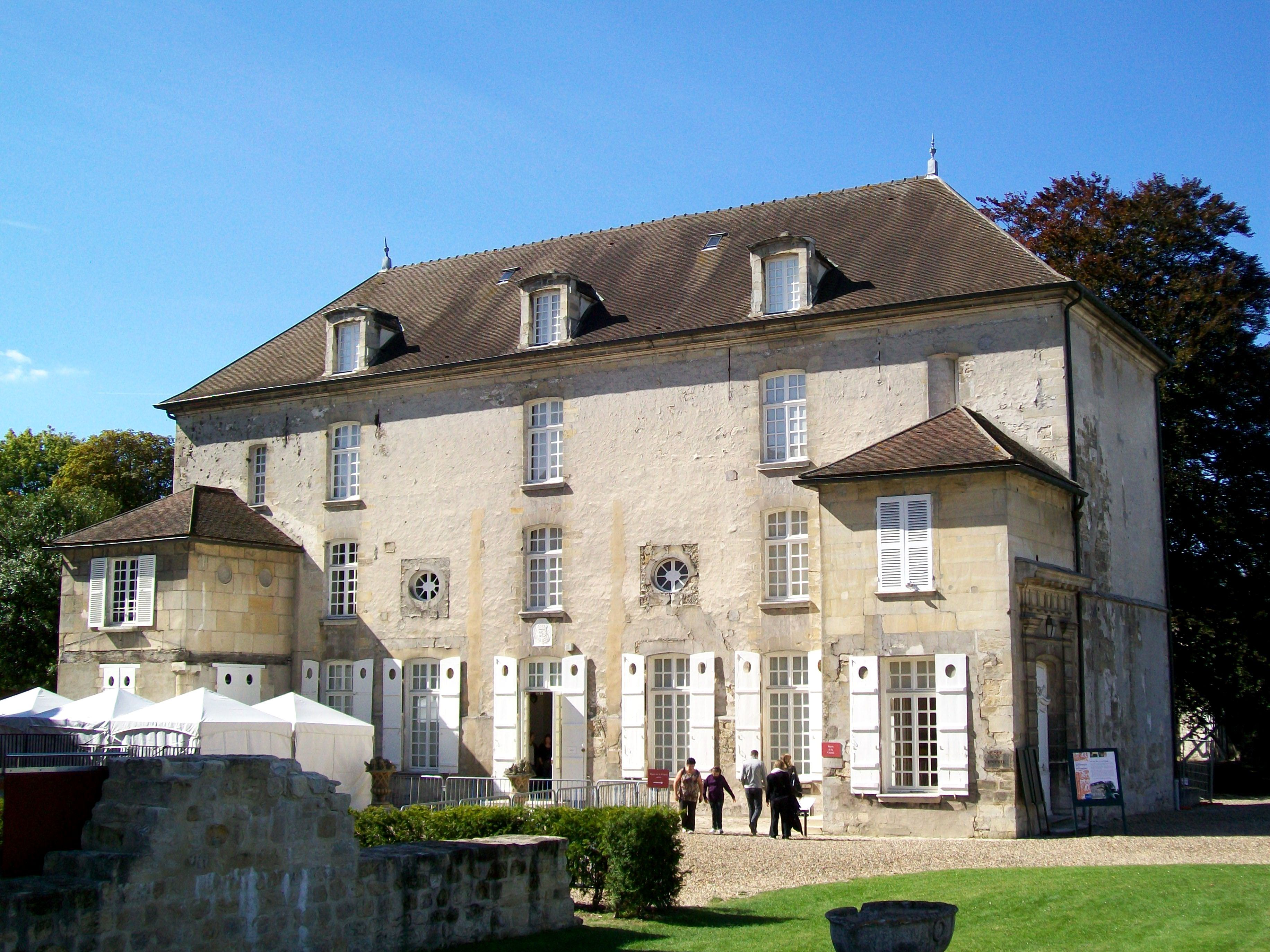 Prieuré St-Maurice, ancien logis du Prieur (XVIIIe s.), actuel musée de la Vénerie.